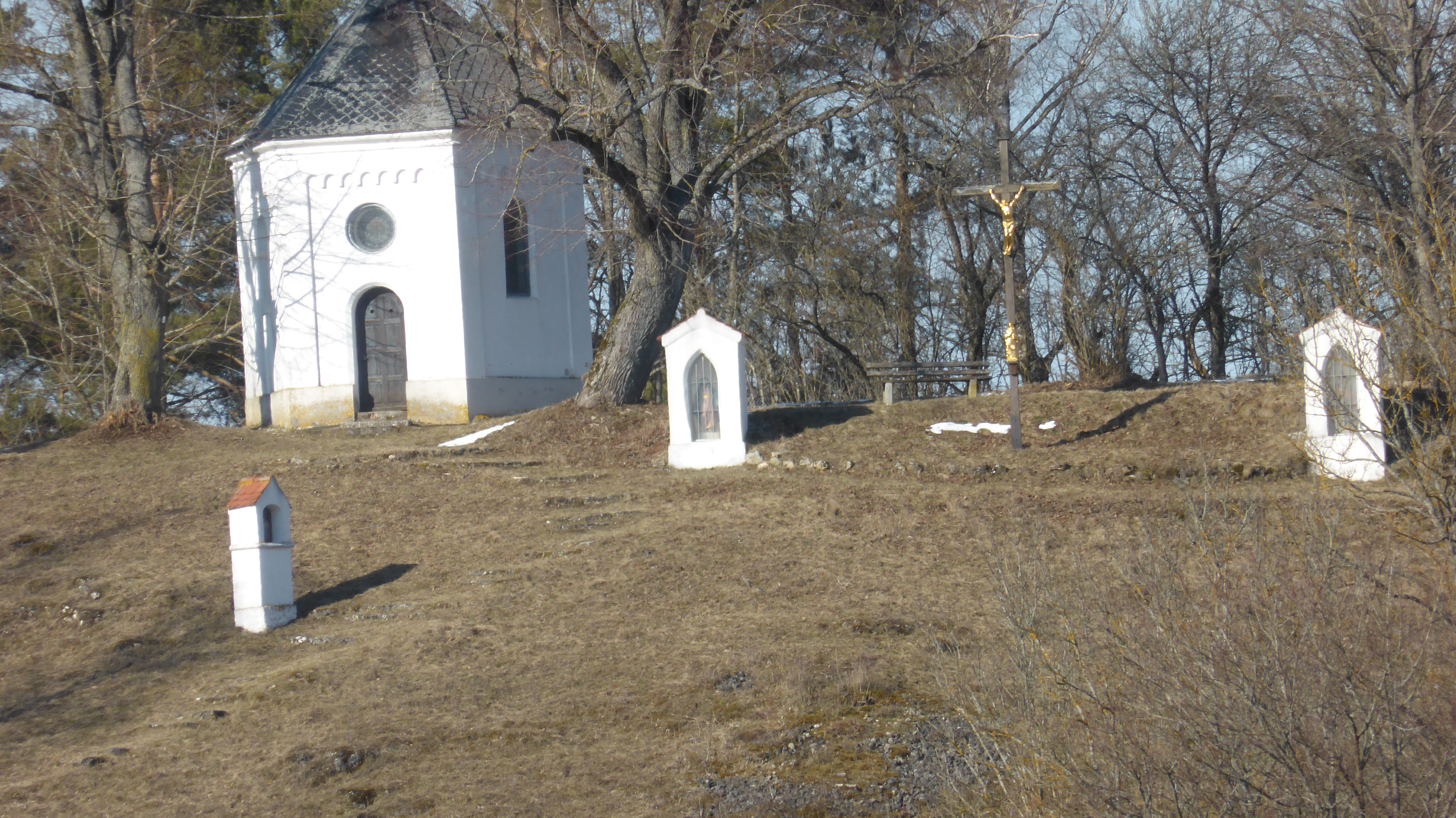 Klausen - Kalvarienkapelle (Hohernfels (Oberpfalz))